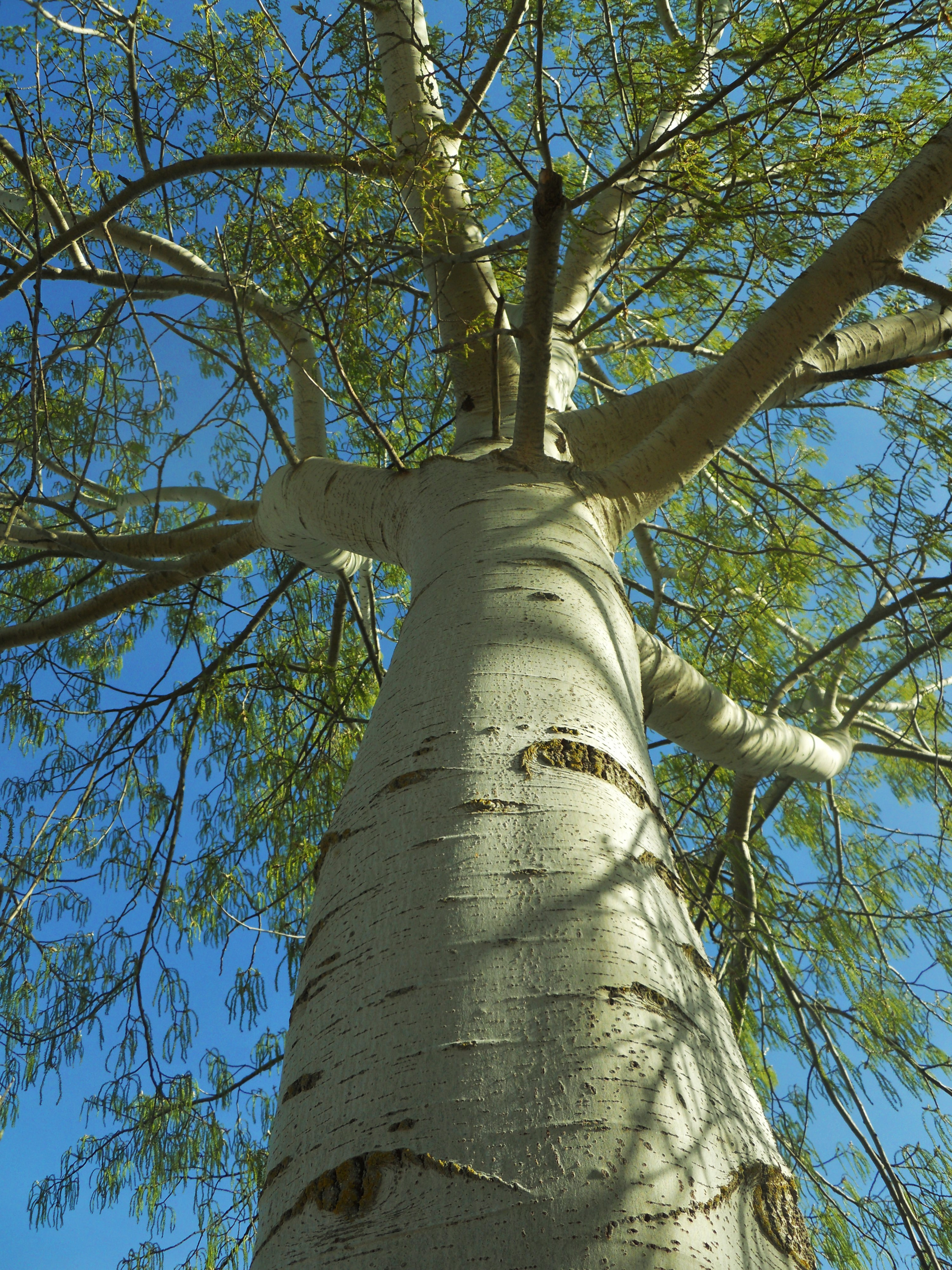 Álamo blanco